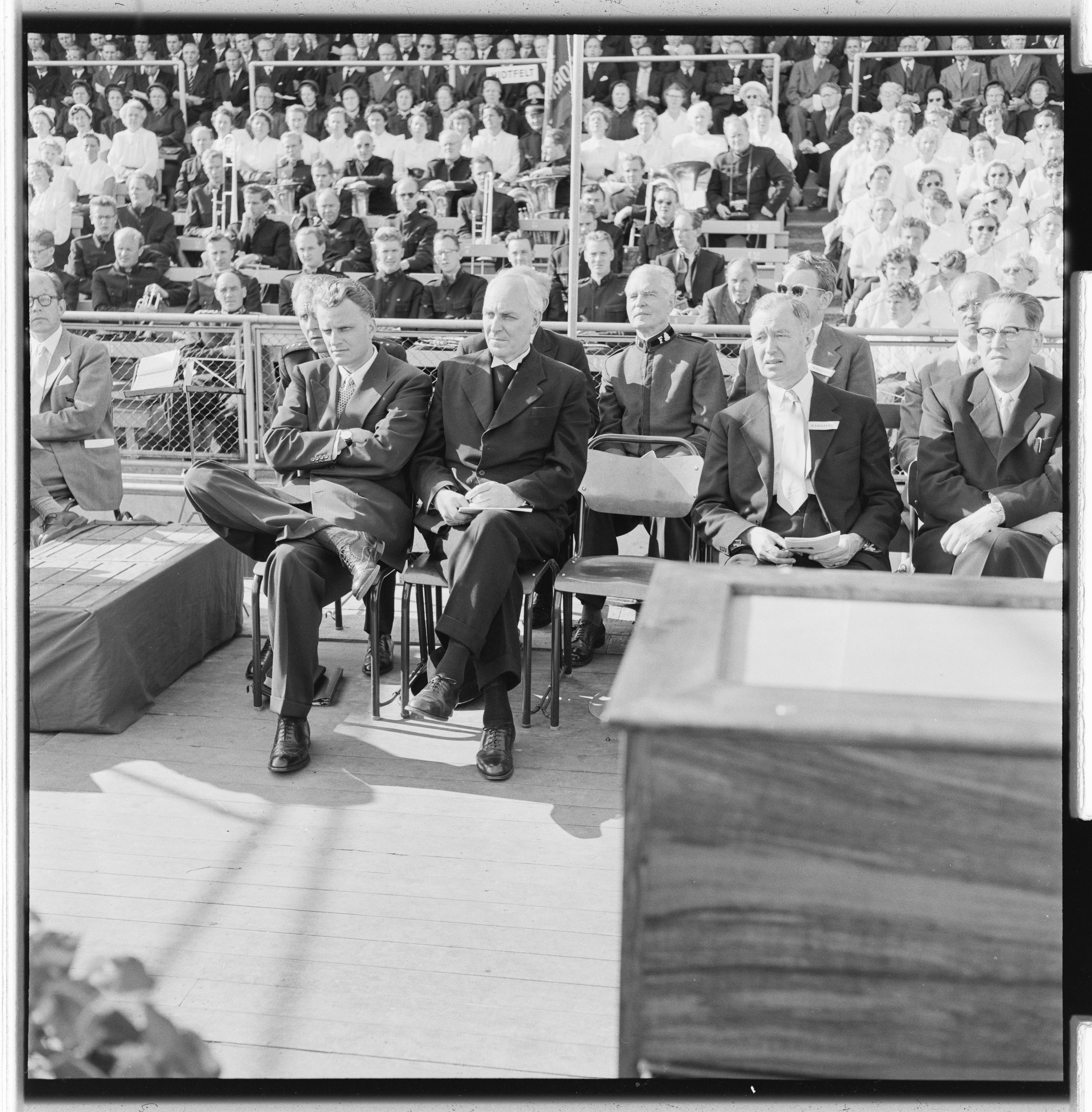 Bildet er hentet fra Arkivverket. Billy Graham Arkivinstitusjon : Riksarkivet Arkivnavn : Billedbladet NÅ Sted : Norge, Oslo, Oslo, Ullevål stadion Emneord: kristendom, forkynnelse, møter Avbildet: I følge Aftenposten 4. juli 1955 viser bildet fra Ullevål Stadion søndag 3. juli 1955 Billy Graham, biskop Johannes Smemo, (sogneprest, dr. Thorleif Boman, formann i komiteen som forberedte møtet, på tom stol), dr. theol. Alf Lier og forstander Erling Strøm. Bak Billy Graham sitter tolken, kaptein i Frelsesarméen Karsten Anker Solhaug. «Grahams tale, som varte ca. en halv time, var enkelt og ukunstlet fremført med intensitet og kraft. Uten i første rekke å appellere til følelsene, maktet han å holde tilhørernes oppmerksomhet fenget ved det gamle, men alltid nye budskap. Ca. 1000 mennesker [seinere omtalt som. 750] fulgte hans appell tilslutt om å komme frem til tribunen og ta en personlig kristen avgjørelse. Frelsesarméens hornorkester og et stort felleskor på ca. 900 sangere plasert bak talertribunen under ledelse av Knut Nystedt, spilte og sang før Grahams tale. På tribunen sammen med Graham og hans team, og de norske arrangører med biskop J. Smemo og sogneprest, dr. Boman i spissen, såes også USA's ambassadør, Lester Corrin Strong og frue.» Efter en kort velkomsttale av sogneprest Boman og åpning med bønn ved Oslo biskop, takket Graham for mottagelsen.»